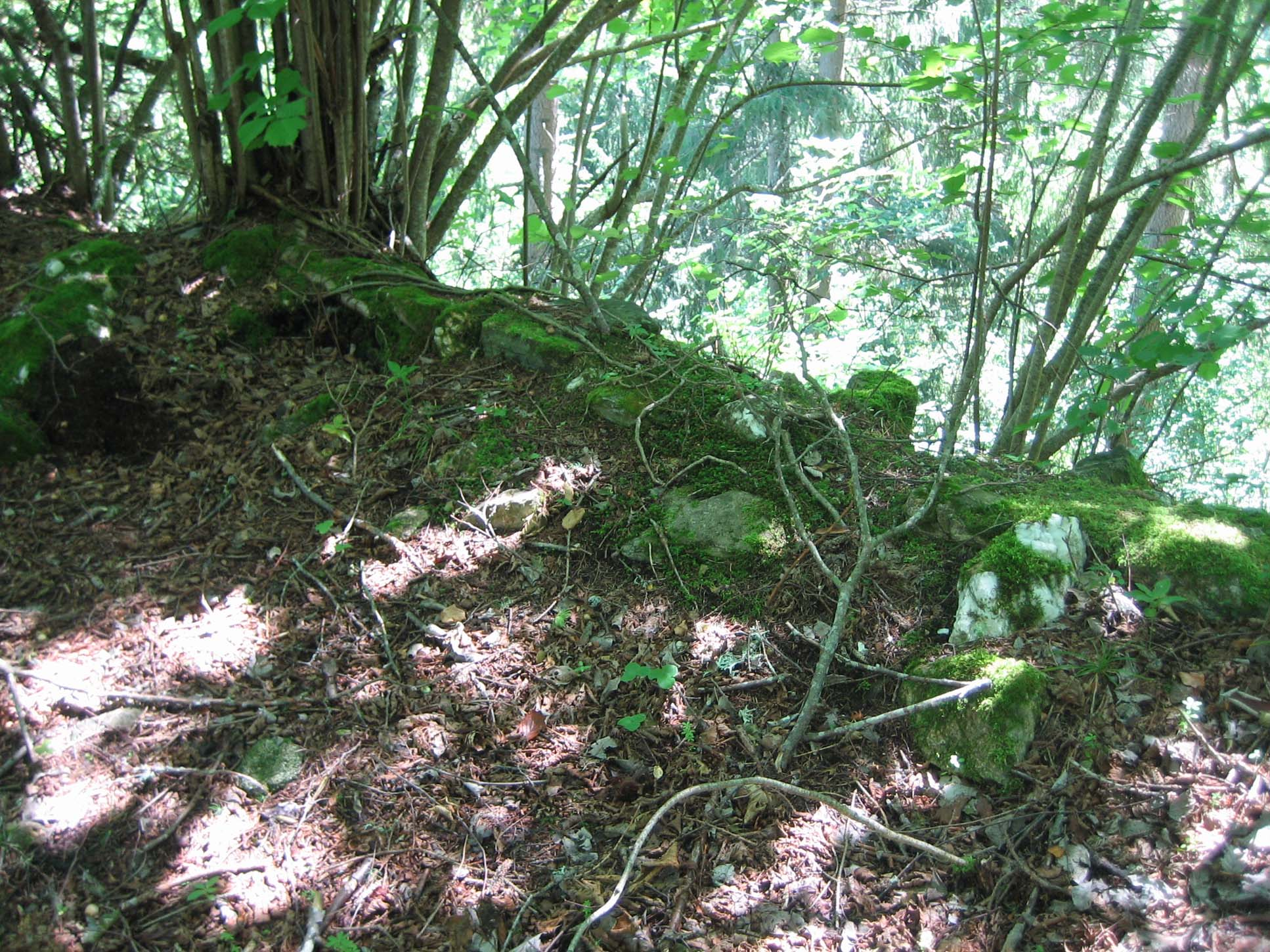 Beringrest Osten